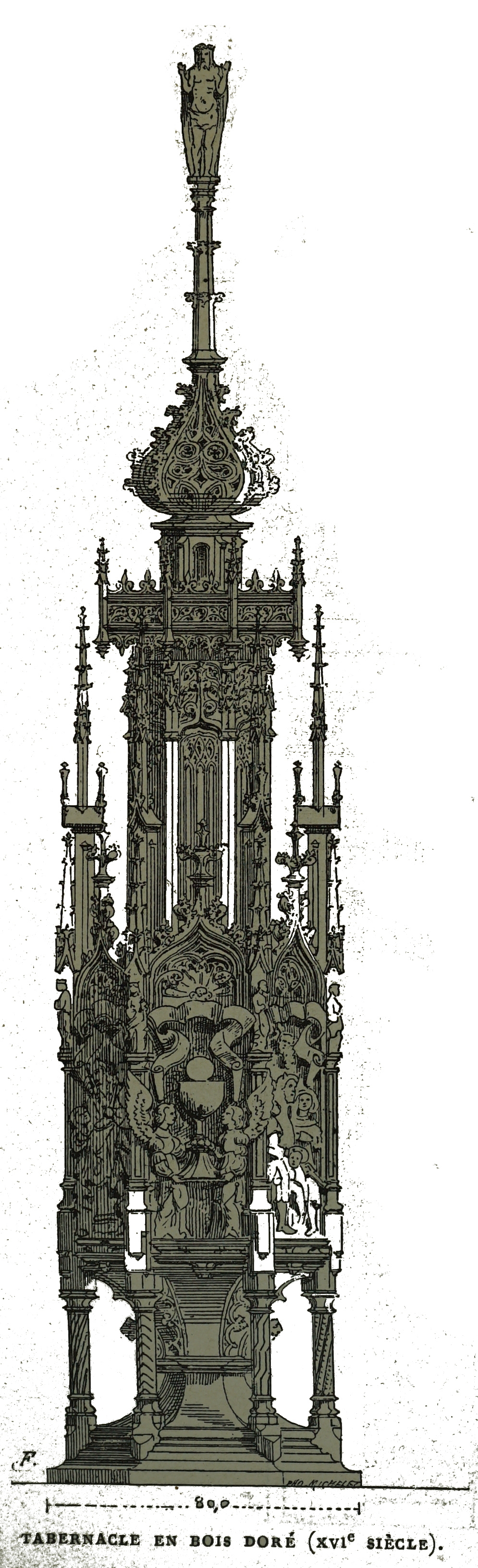 par un dessin de Fichot.